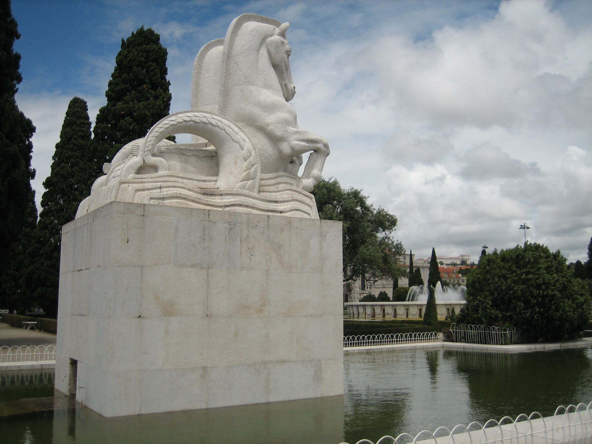 Belém